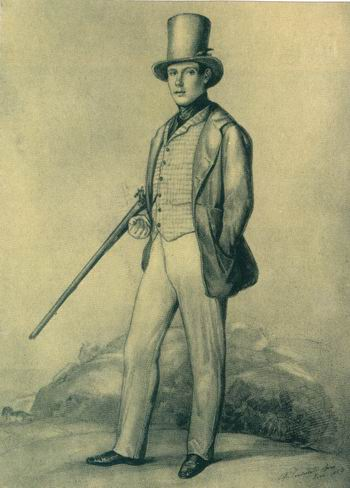 Alexander van Oranje (1818-1848).